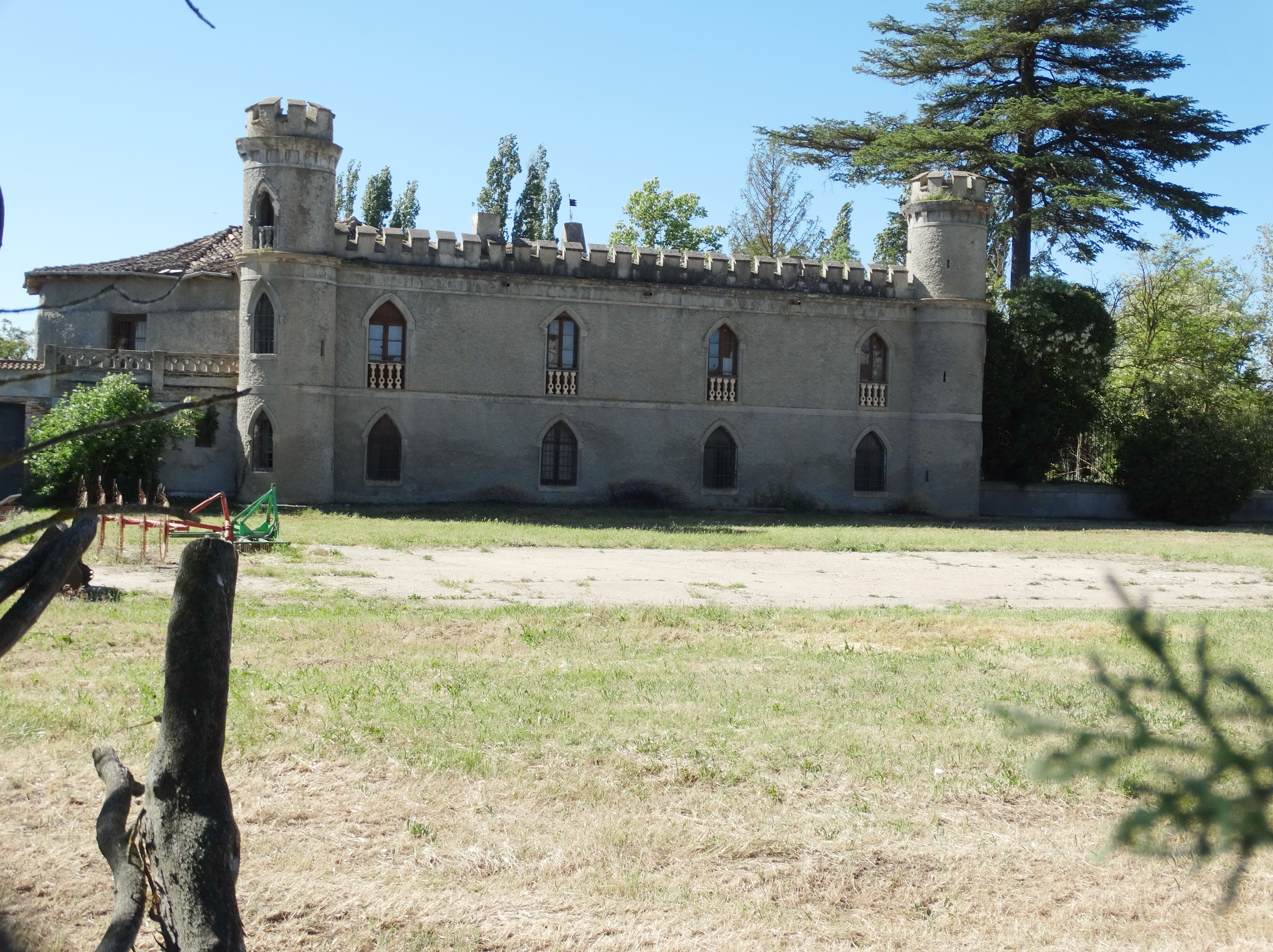 Priorato de Santa María de Duero o de las Mamblas en el término de Tudela de Duero, Valladolid, España. Rodeado por una cerca almenada tipo castillete. Desamortizado en el siglo XIX y reconvertido en granja agrícola.